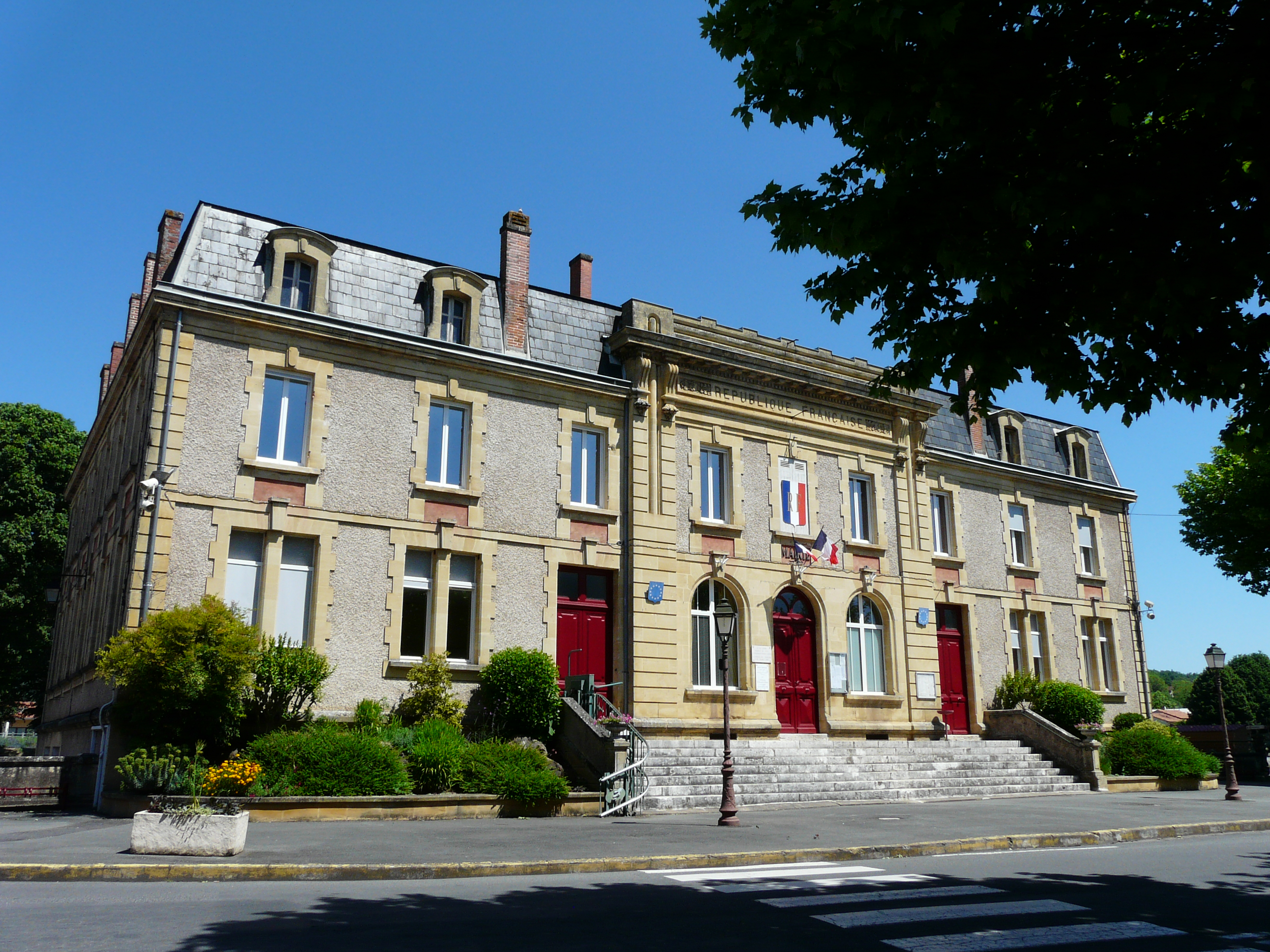 La mairie de Lalinde, Dordogne, France.